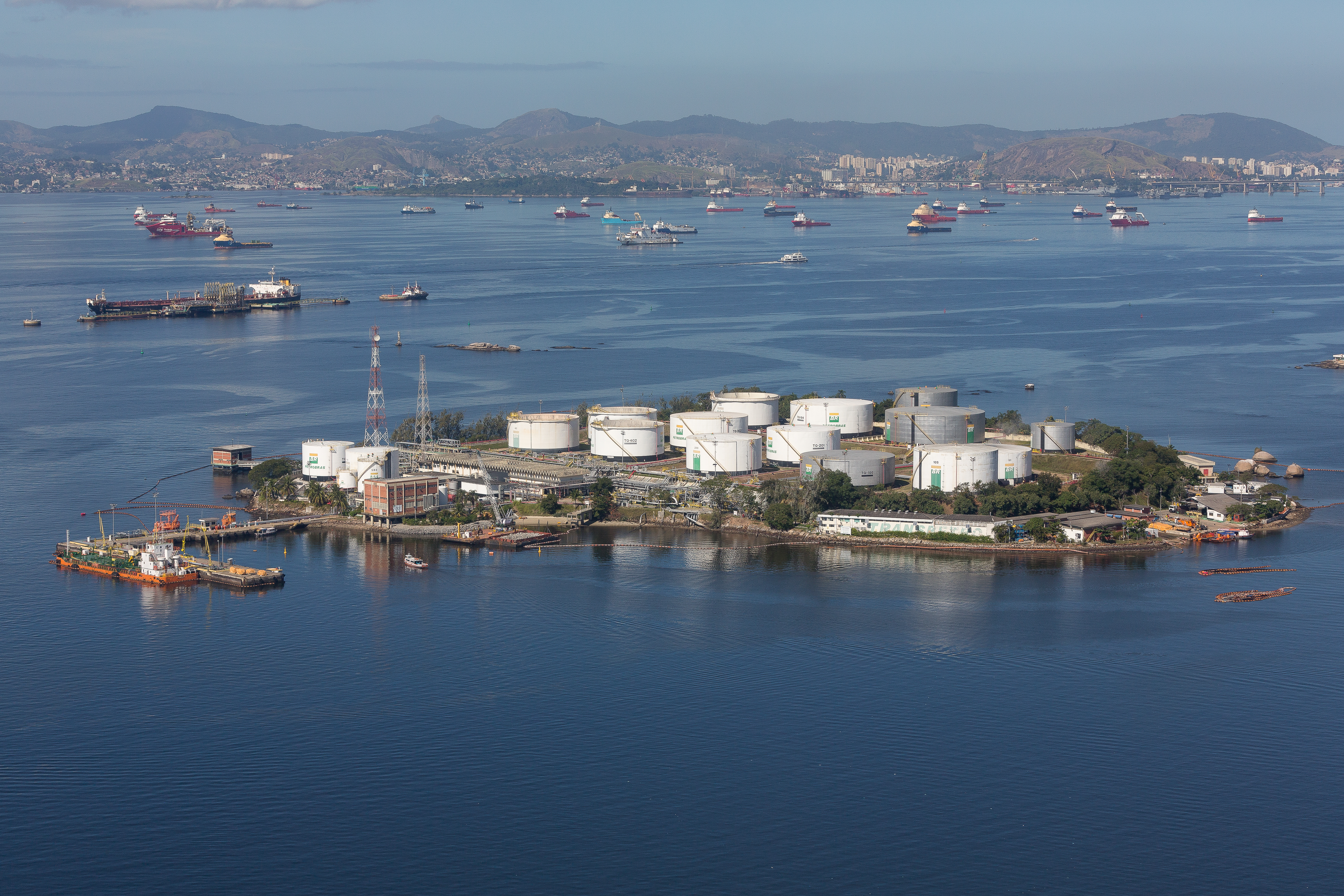 Vista aérea da Ilha D'Água com o terminal da empresa Transpetro. Rio de Janeiro - RJ - Brasil.